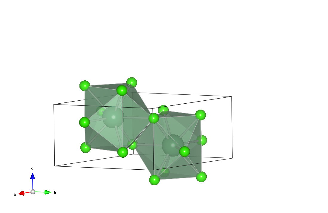 structure cristalline du chlorure d'actinium. Dessiné à l'aide de VESTA : K. Momma and F. Izumi, "VESTA: a three-dimensional visualization system for electronic and structural analysis." J. Appl. Crystallogr., 41:653-658, 2008.